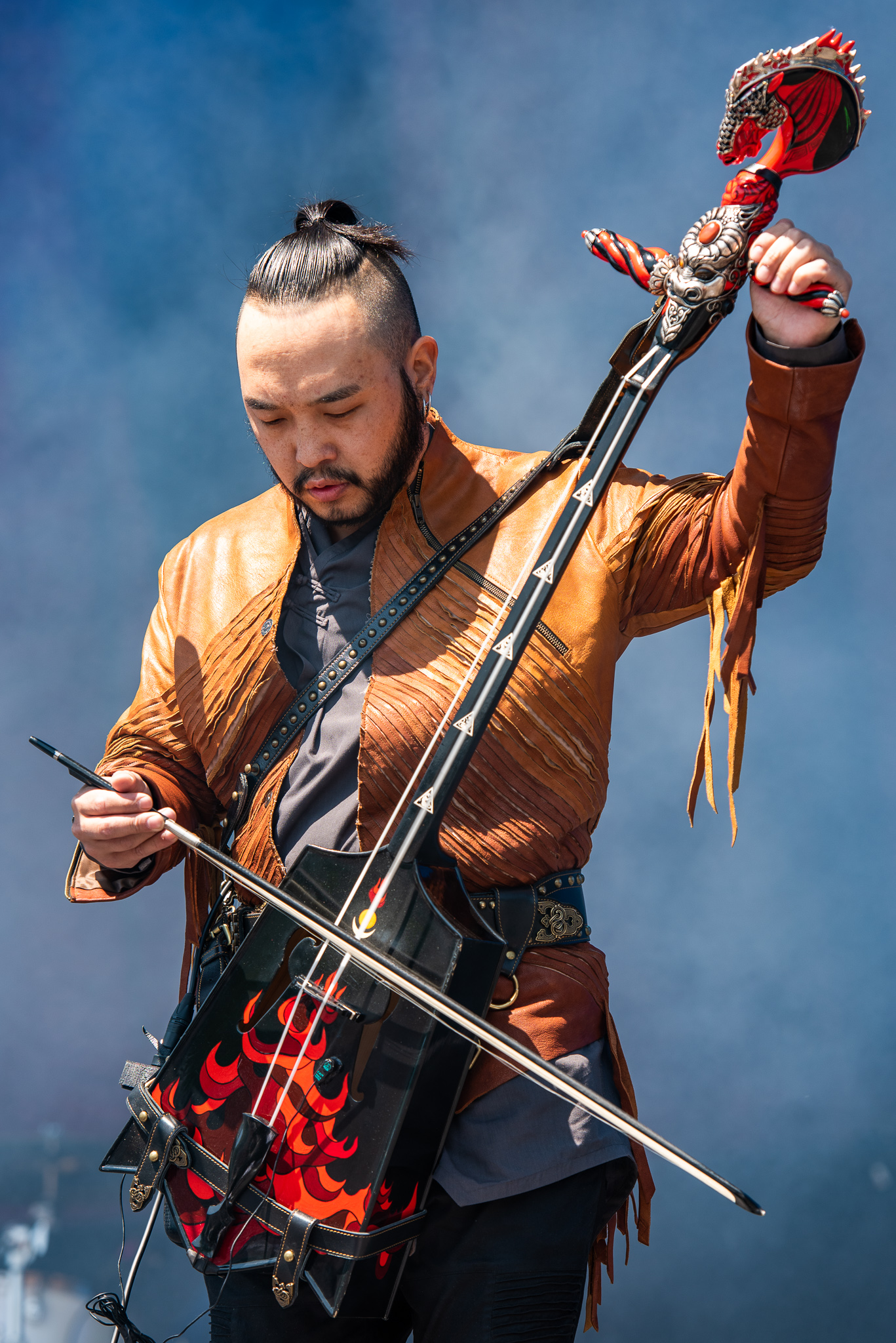 ARGO-Konzerte,Beck's Park Stage,Konzert,Livekonzert,Livemusik,Musik,RiP,Rock im Park 2019,The Hu